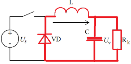 Voolu liikumine, kui lüliti on avatud